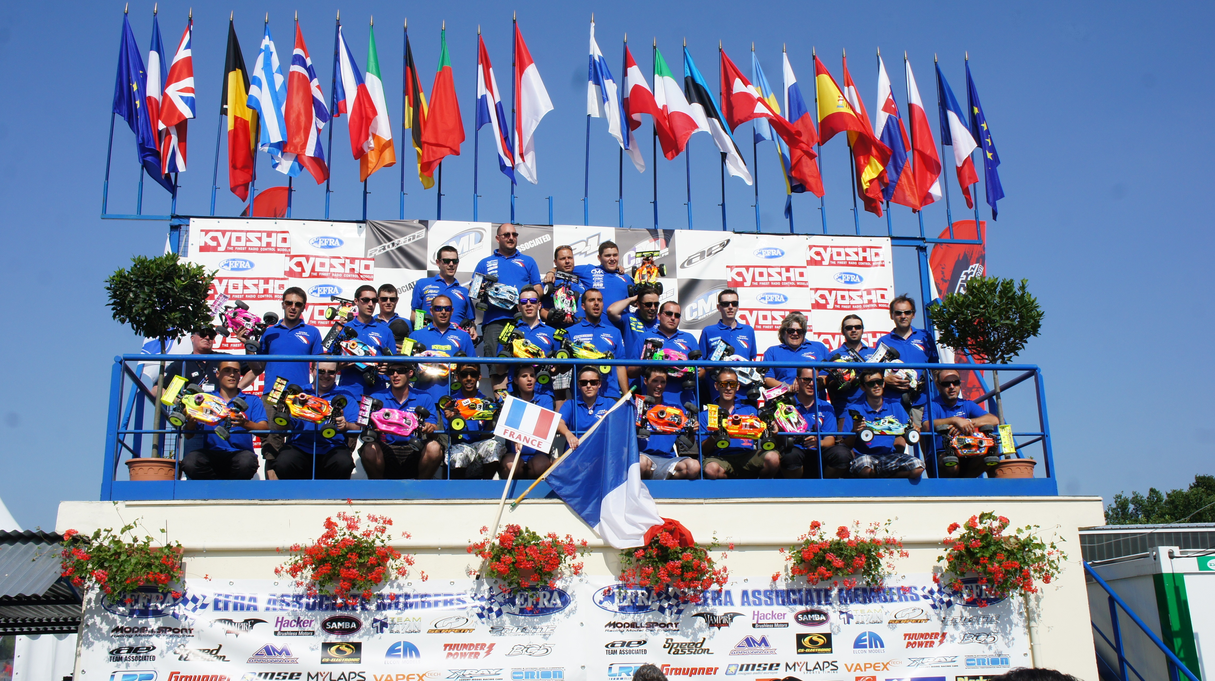 Présentation des équipes lors du Championnat d'Europe EFRA 2013 à Reims.